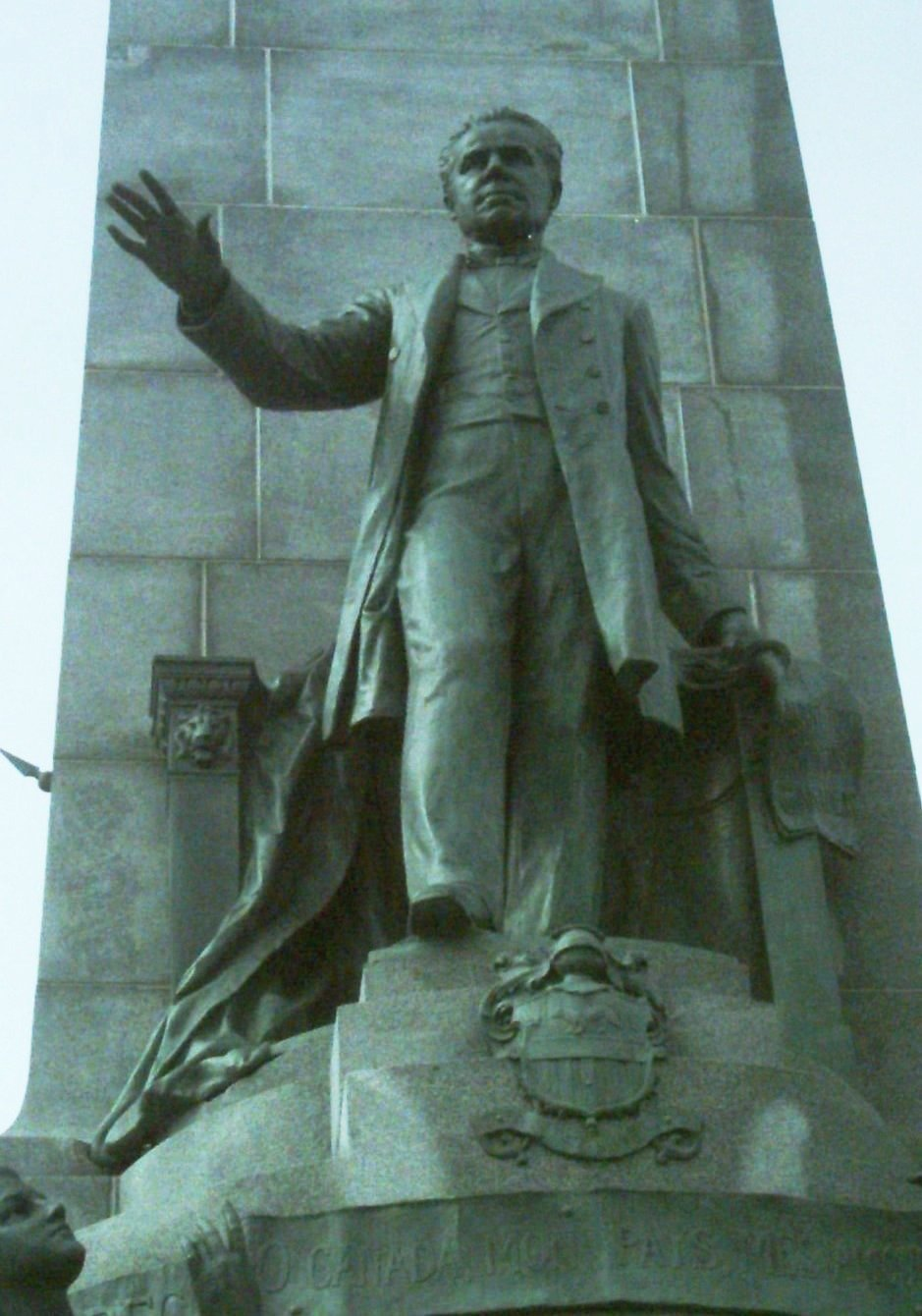 Détail Nord du Monument à George-Étienne Cartier à Montréal.